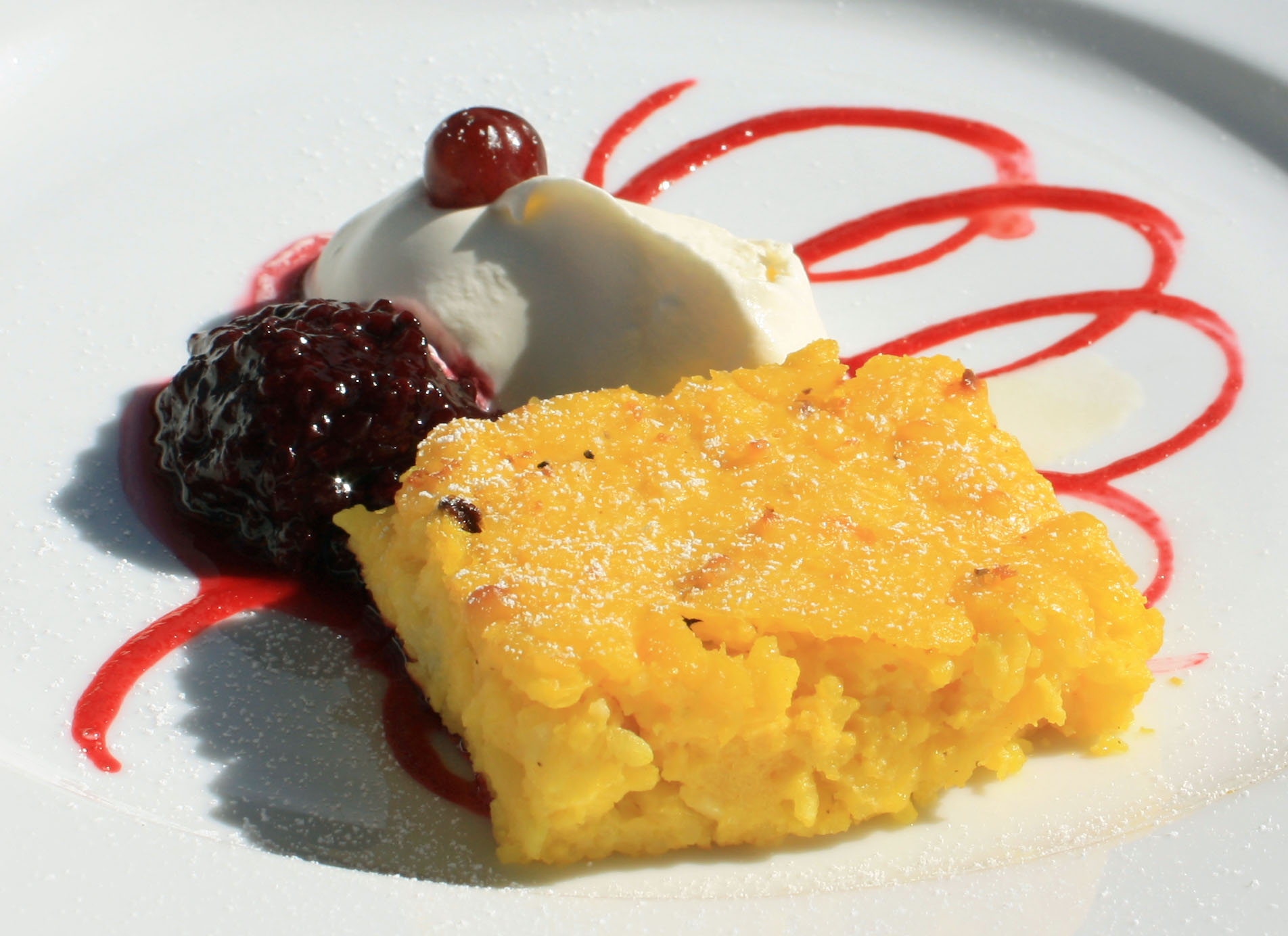 Saffranspannkaka med salmbär (blåhallon) och vispad grädde.Unknown swedish saffron pancake from gotland with dewberry and wipped cream.